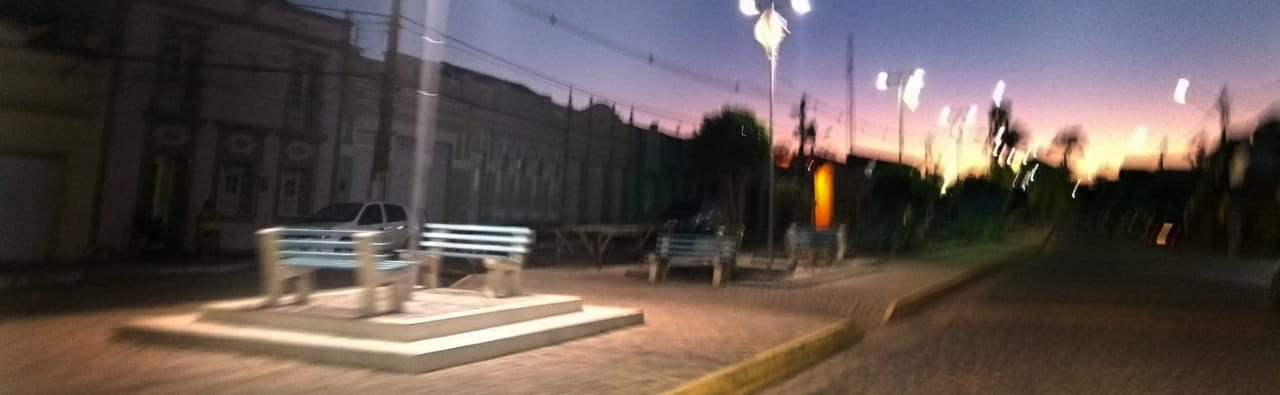 Alguns clicks do interior de PE no ângulo de um carro em movimento. Foto por Gabriella Andrade (Facebook)